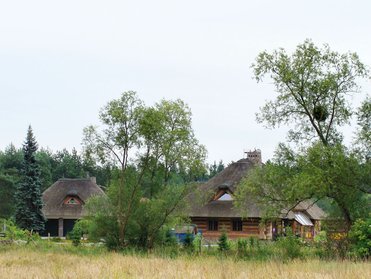 Węgornik (gmina Police)